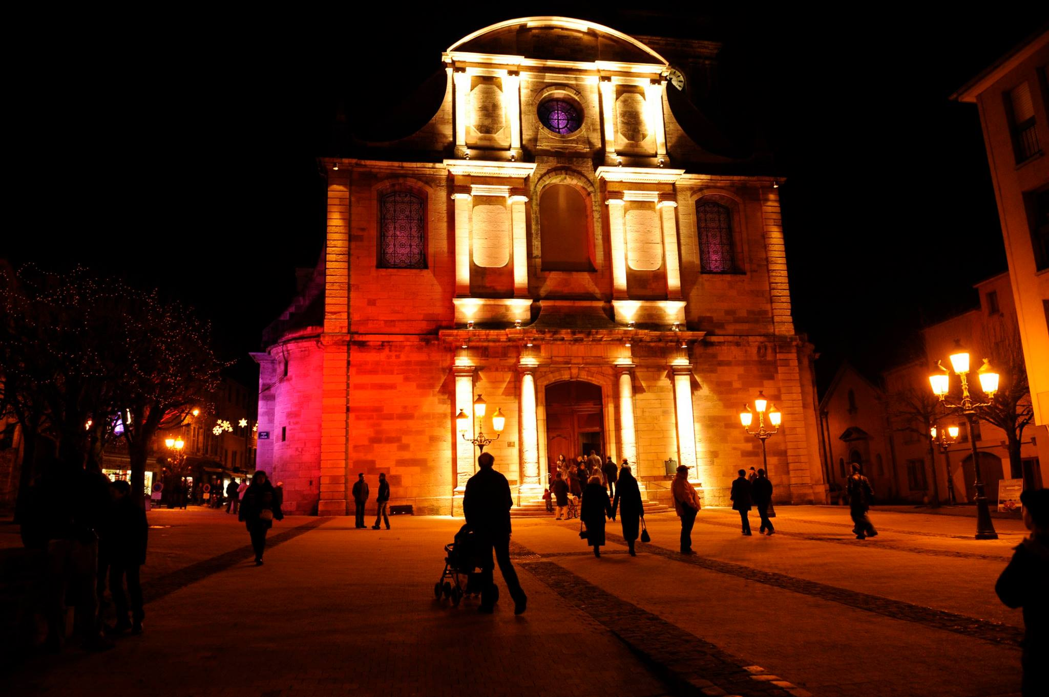 L'église Saint-Georges de Vesoul, la nuit